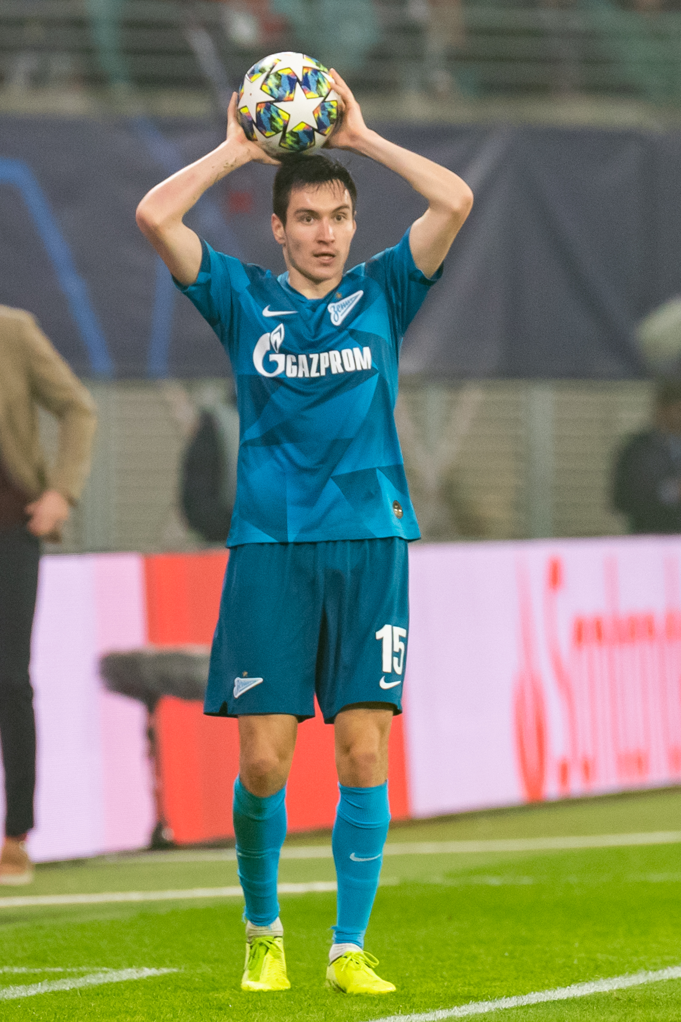 Fußball, Männer, UEFA Champions League, RB Leipzig - FC Zenit St. Petersburg; Vyacheslav Karavaev (Вячеслав Караваев, Zenit St. Petersburg, 15) beim Einwurf